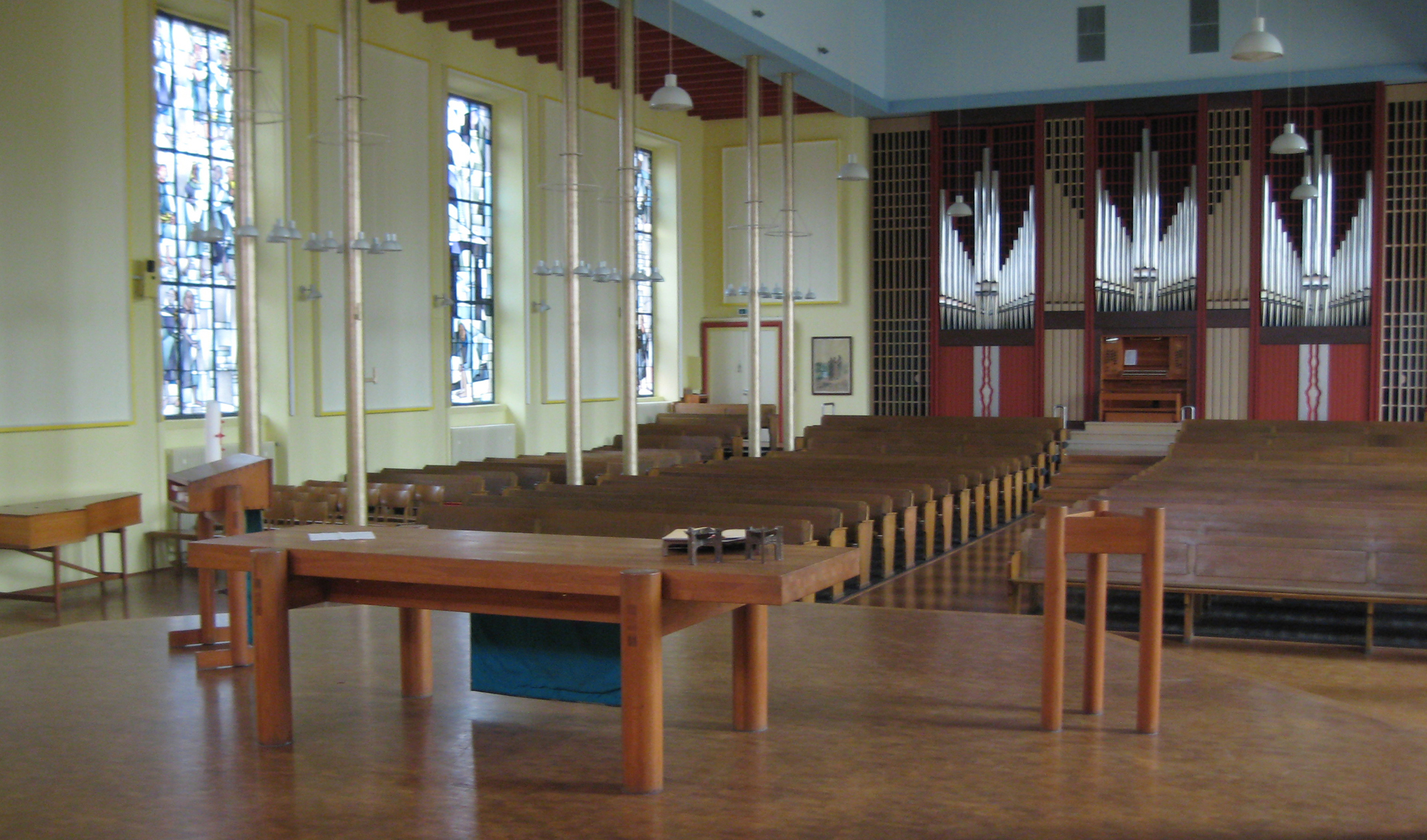 Lukaskirche Ffm Altarraum